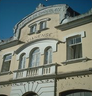 Fachada da Fabrica de Chocolate